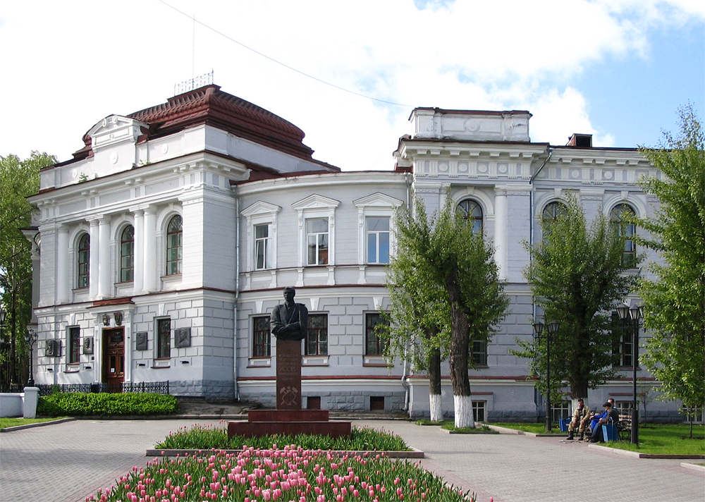 1 корпус ТПУ (ул. Советская, 73)